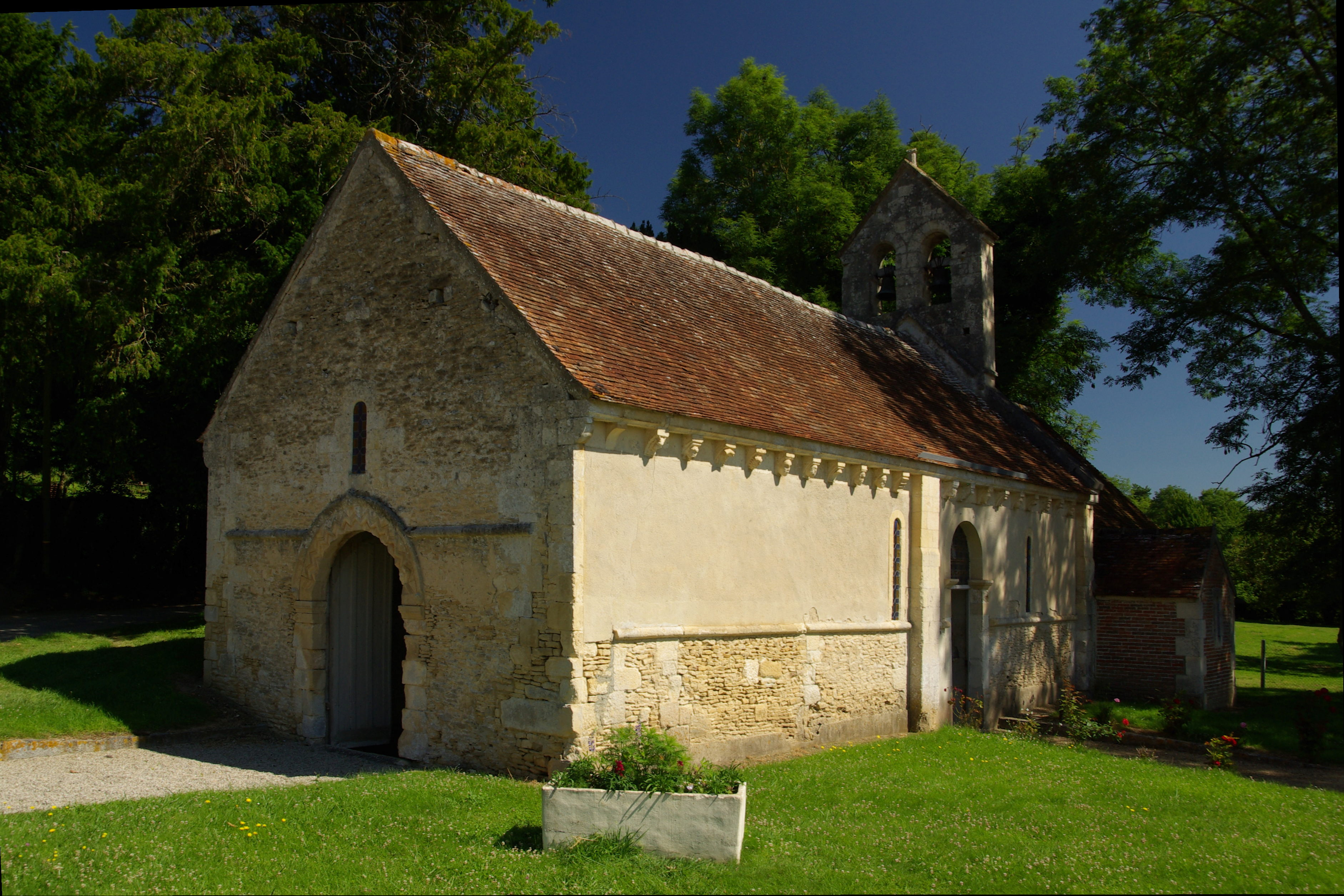 Chapelle Saint Anne (1050) située au lieu-dit Sainte-Anne-d'Entremont, commune de Bernières d'Ailly, Calvados